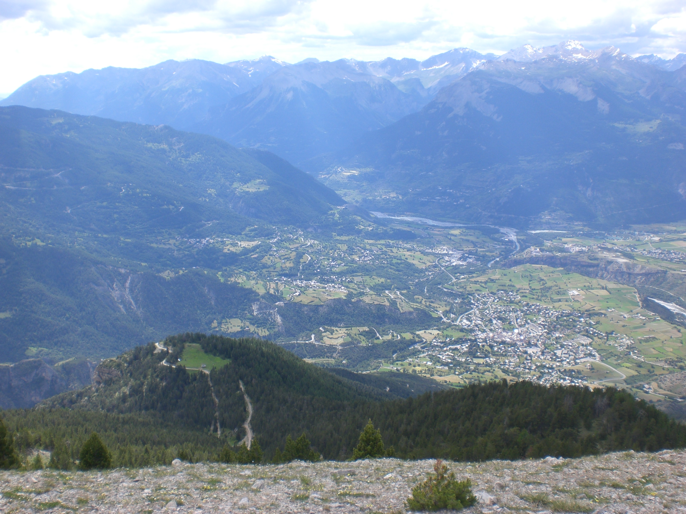 Guillestre à droite. Risoul à gauche. Azimut de prise de vue d'environ 300°, c'est à dire du Mont Cugulet vers la confluence du Guil avec en arrière plan l'église de Réotier (rive droite Durance)